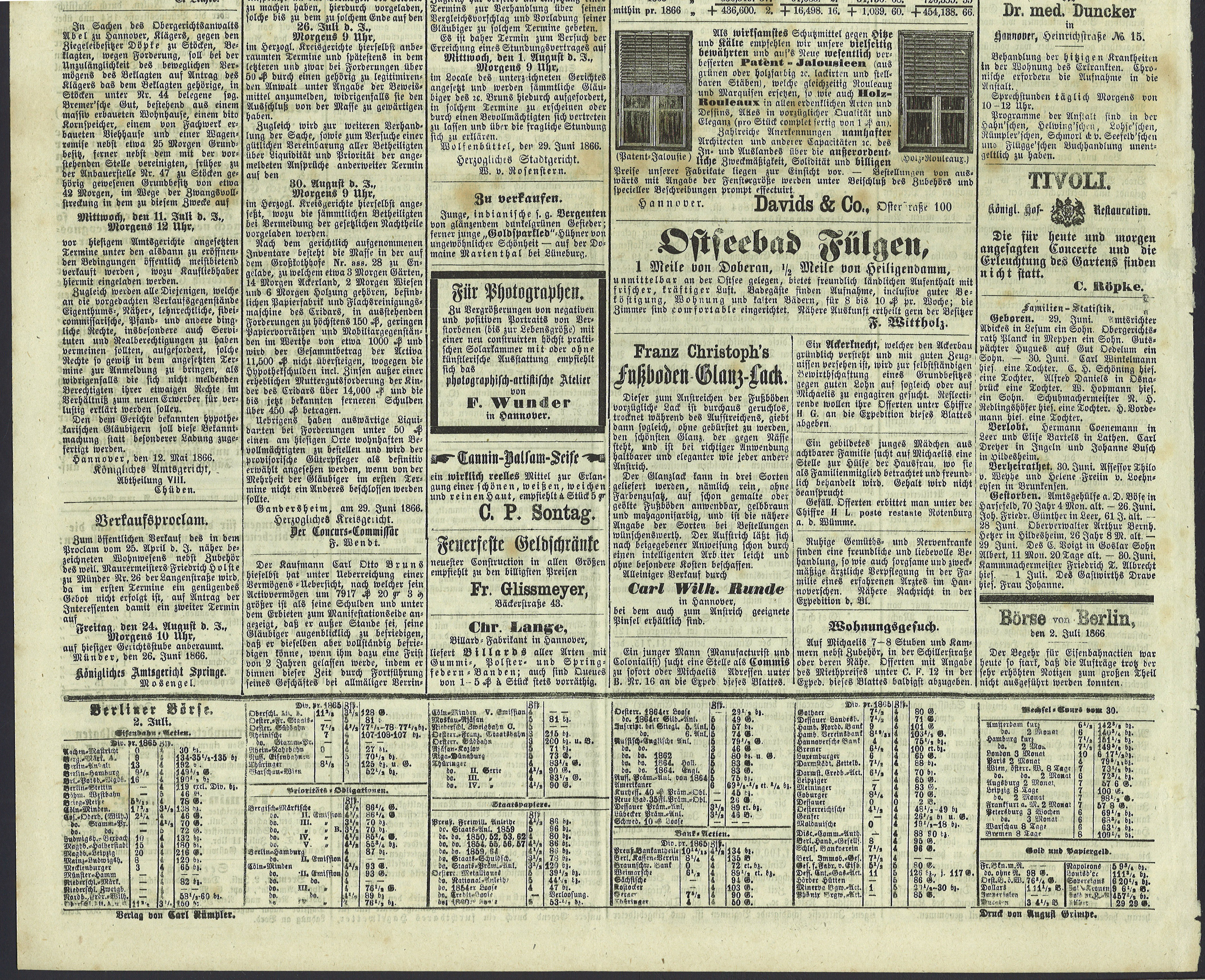 Hannoverscher Courier. Allgemeine Zeitung für das Königreich Hannover. Redaction und Haupt-Expedition: Marktstraße 63 No. 3621, Hannover, Dienstag, den 3. Juli 1866, XIII. Jahrgang Seite mit den Maßen ca. DIN A2, unterer Teil